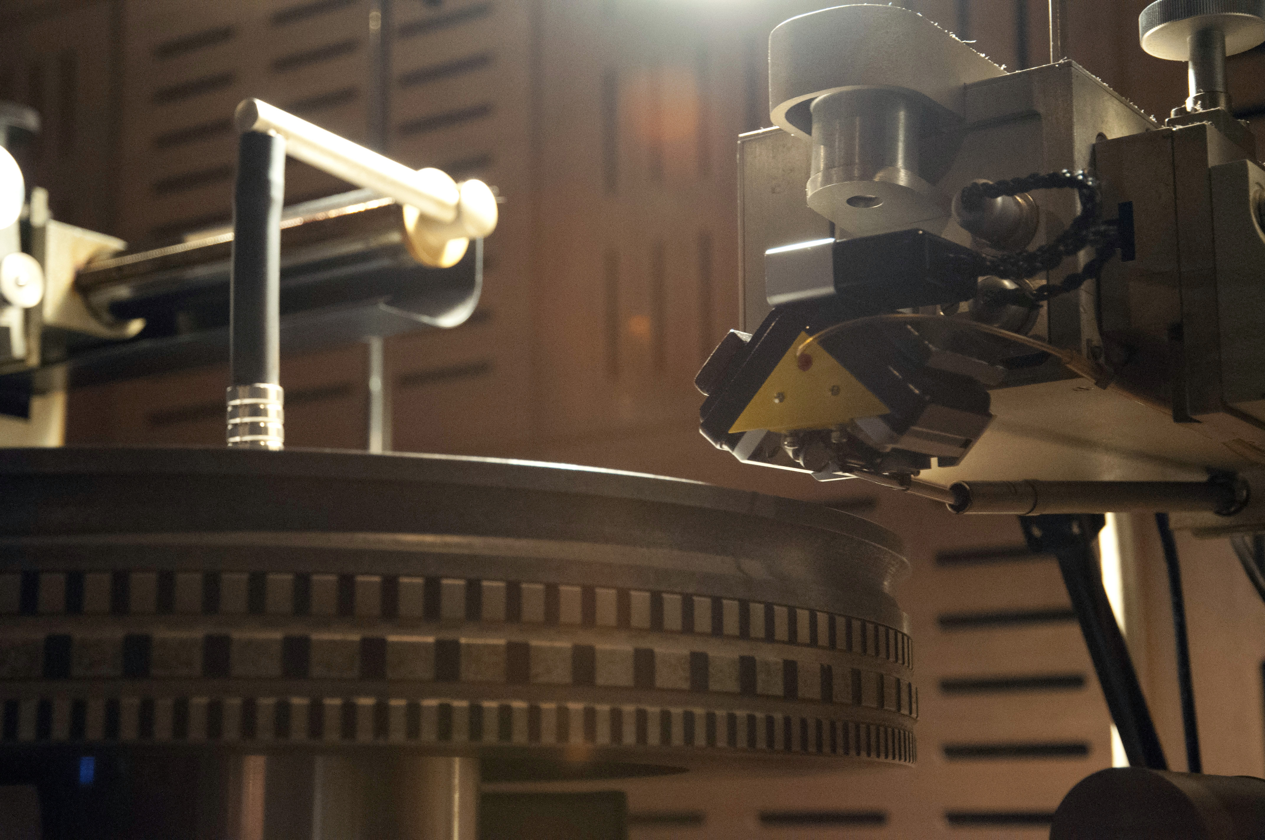 Neumann Record Cutting Machine